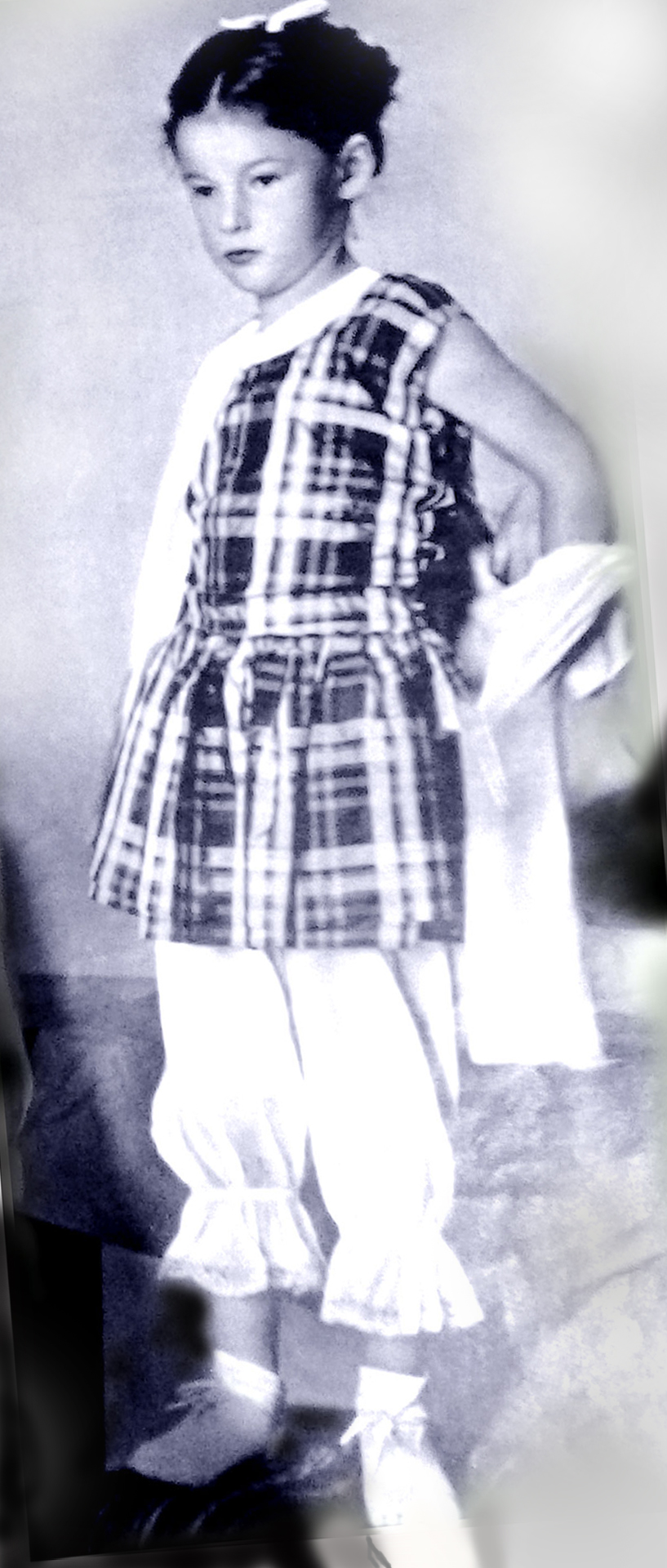 L'attrice bambina Mariù Pascoli durante un provino per "Piccolo mondo antico" (Soldati, 1940)